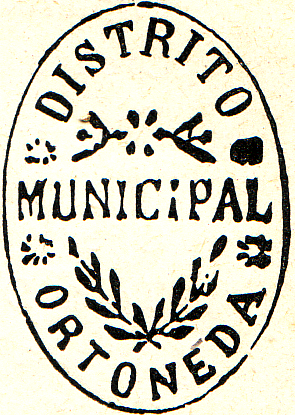 Segell municipal antic d'Hortoneda de la Conca (Conca de Dalt, Pallars Jussà)